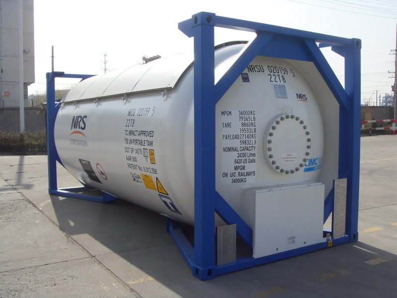 Газовый танк контейнер производства CIMC Т50